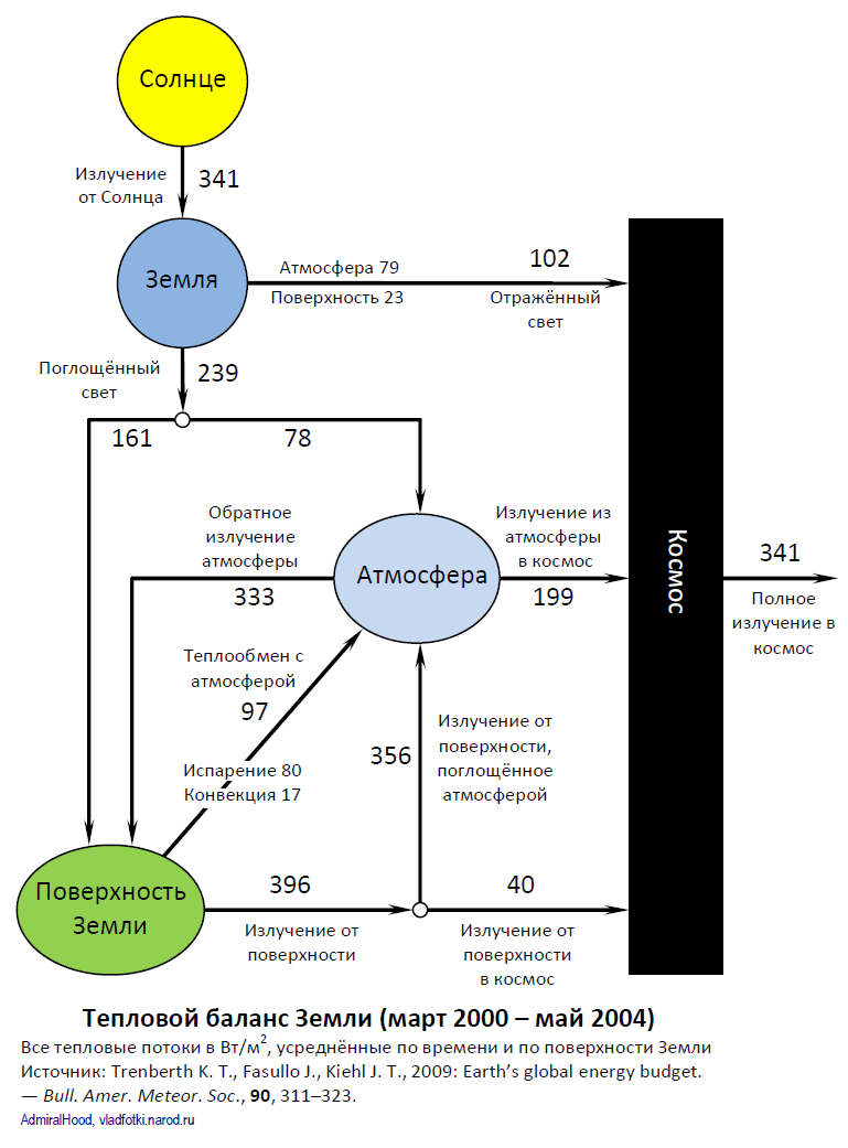 Тепловой баланс Земли. По материалам «Физическая энциклопедия. В 5-ти томах. — М.: Советская энциклопедия. Главный редактор А. М. Прохоров. 1988»